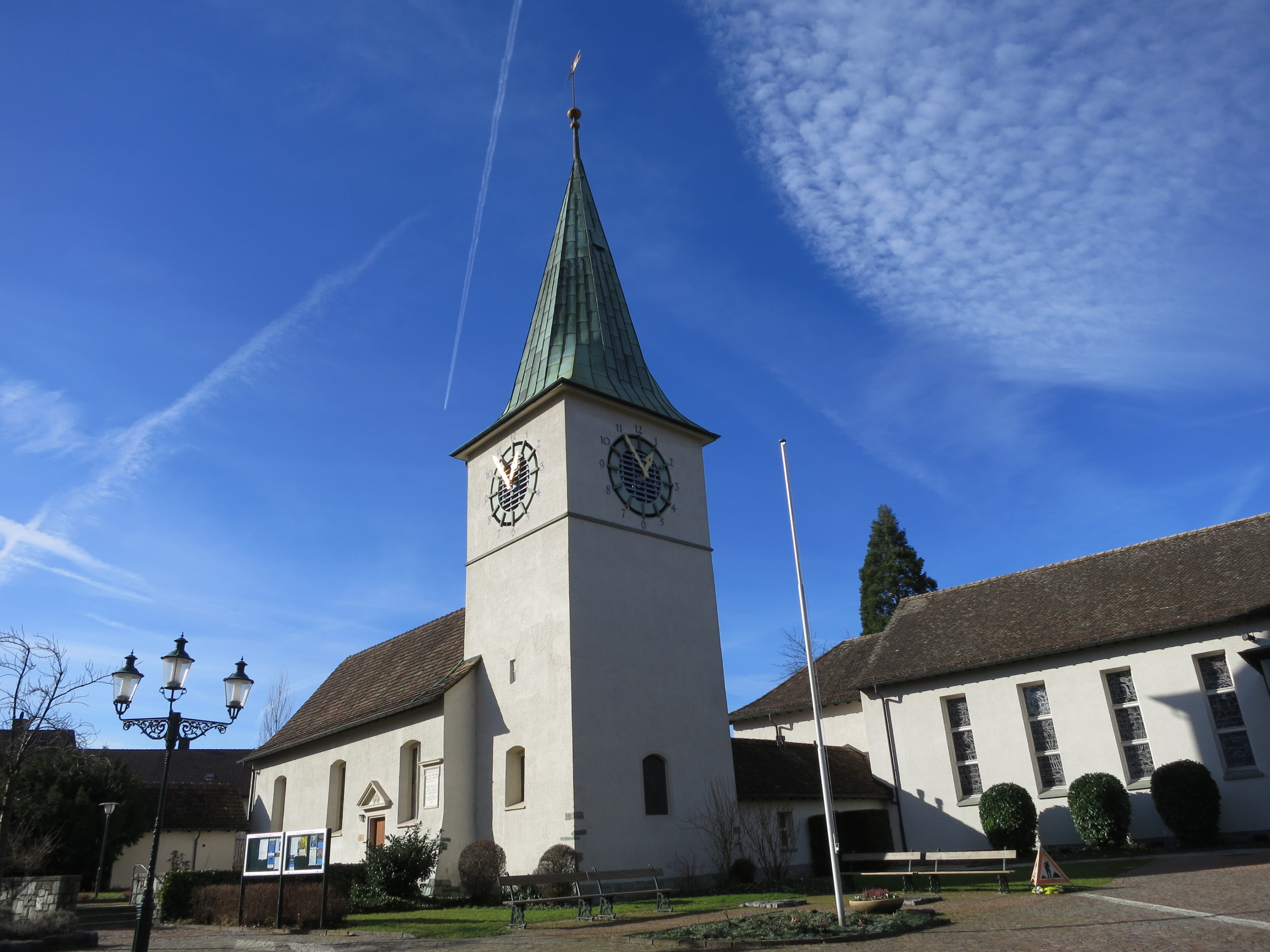 Reformierte Kirche, Schlieren ZH, Schweiz